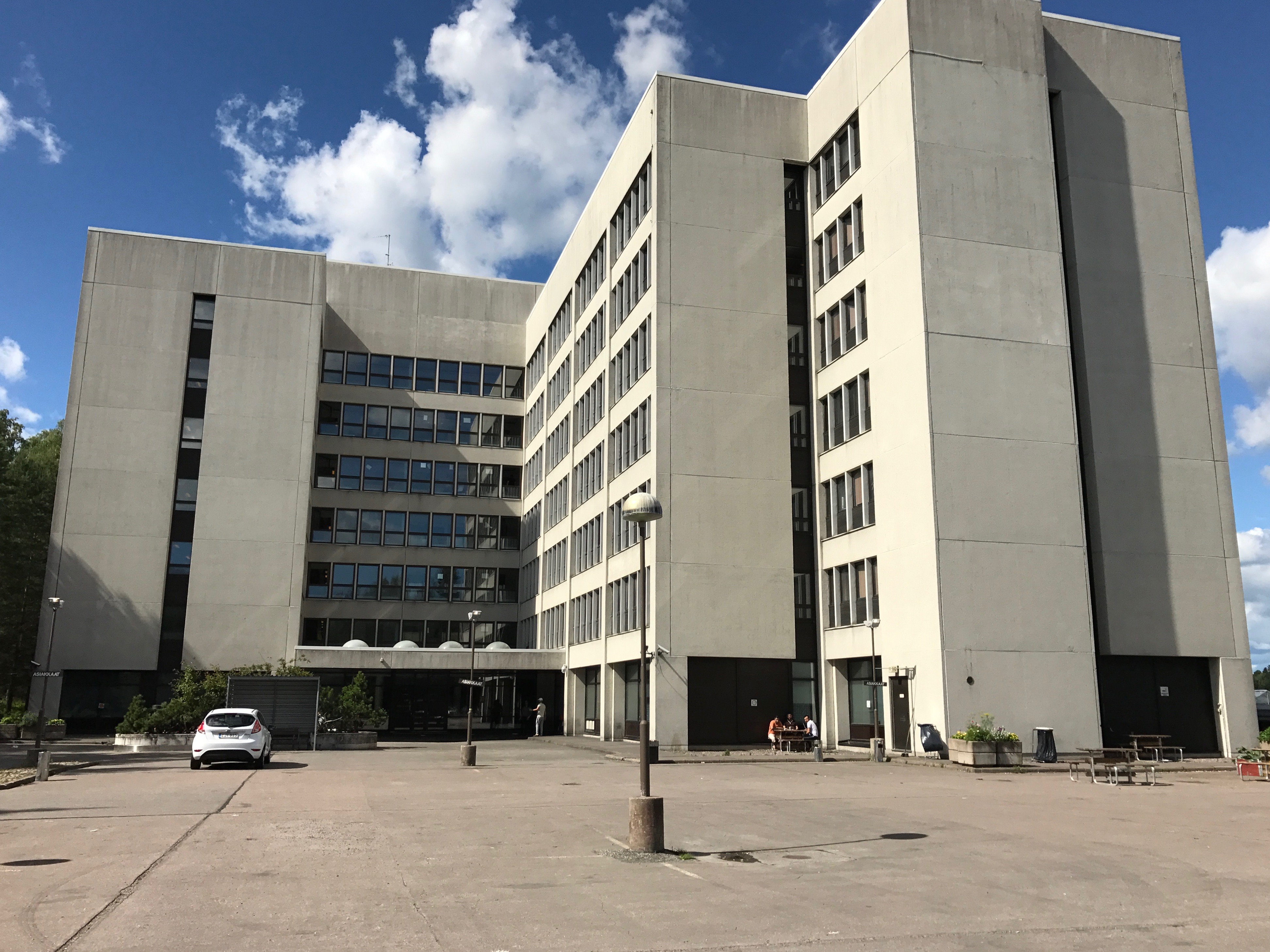 Nihtisillan vastaanottokeskus on yksityisen Luona Oy:n ylläpitämä aikuisten turvapaikanhakijoiden vastaanottokeskus Espoon Kilossa, osoitteessa Kutojantie 10.